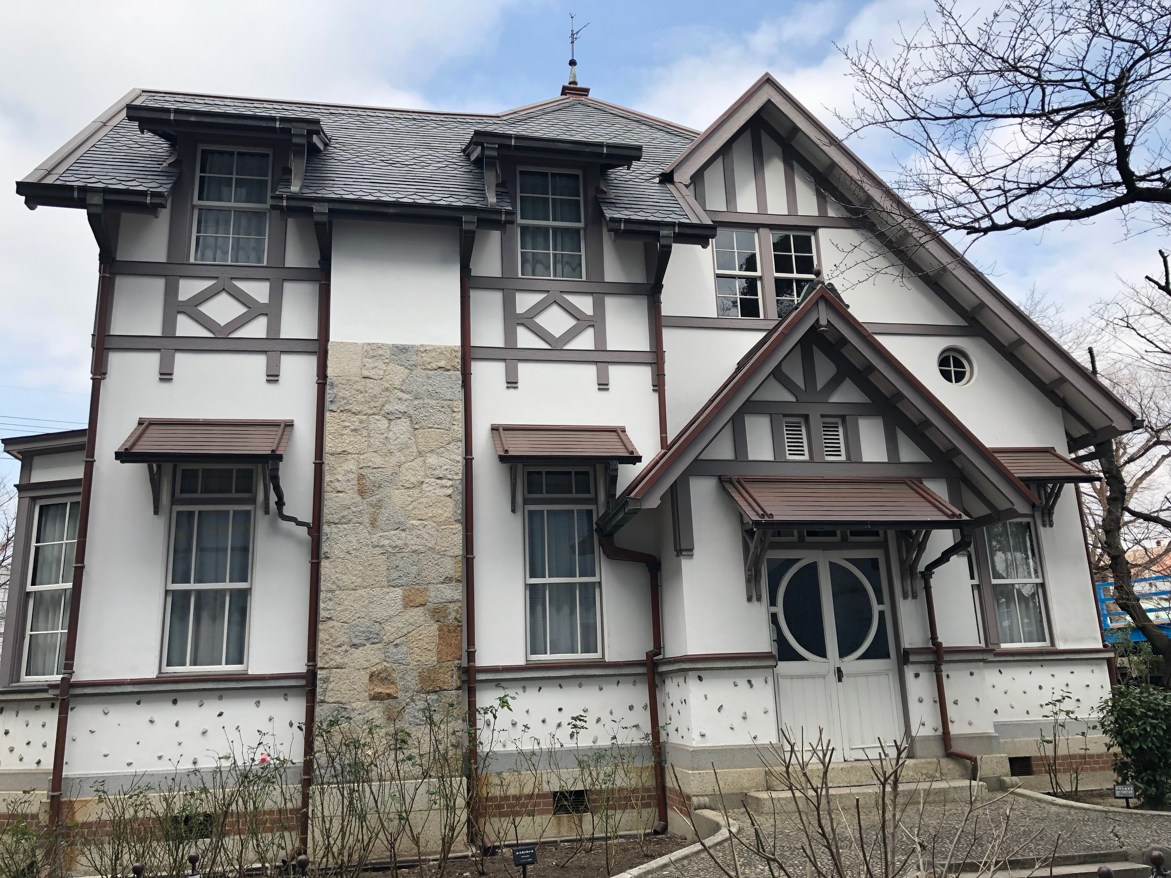 ２０１９年２月１６日撮影